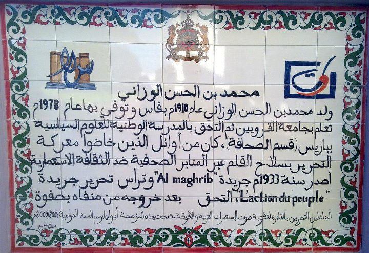 Statut officiel du lycée, il y est écrit la biographie de Mohamed Ben Hassan el Ouazzani (personne)